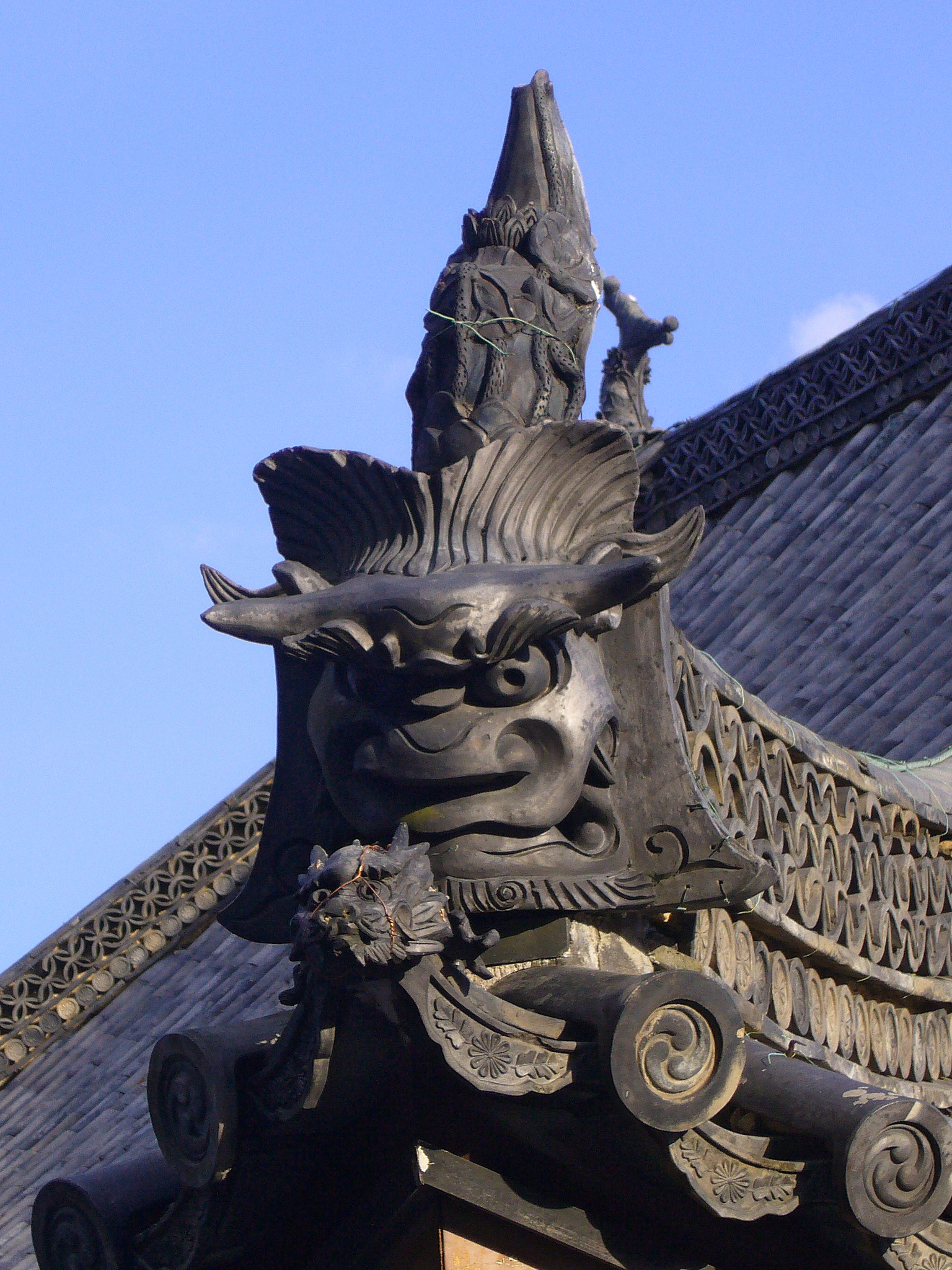 Nakayamadera in Takarazuka, Hyogo prefecture, Japan